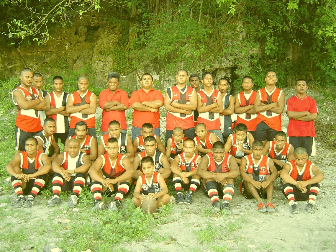 Aufnahmeort: Aiwo, Nauru